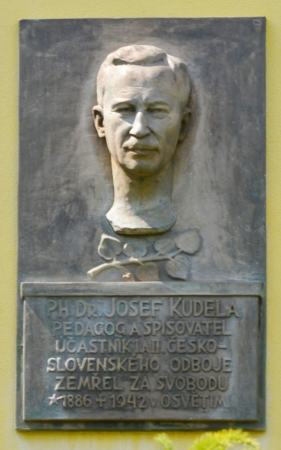 Gedenktafel für Josef Kudela